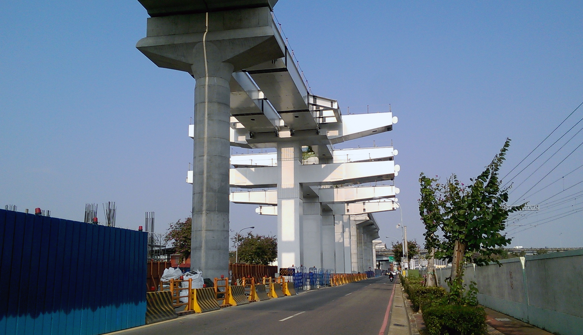 臺中捷運九張犁站2015年2月工程